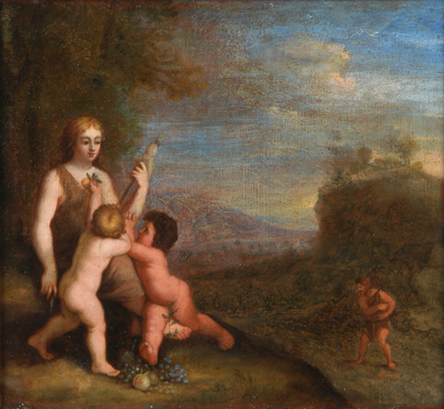 Schilderij